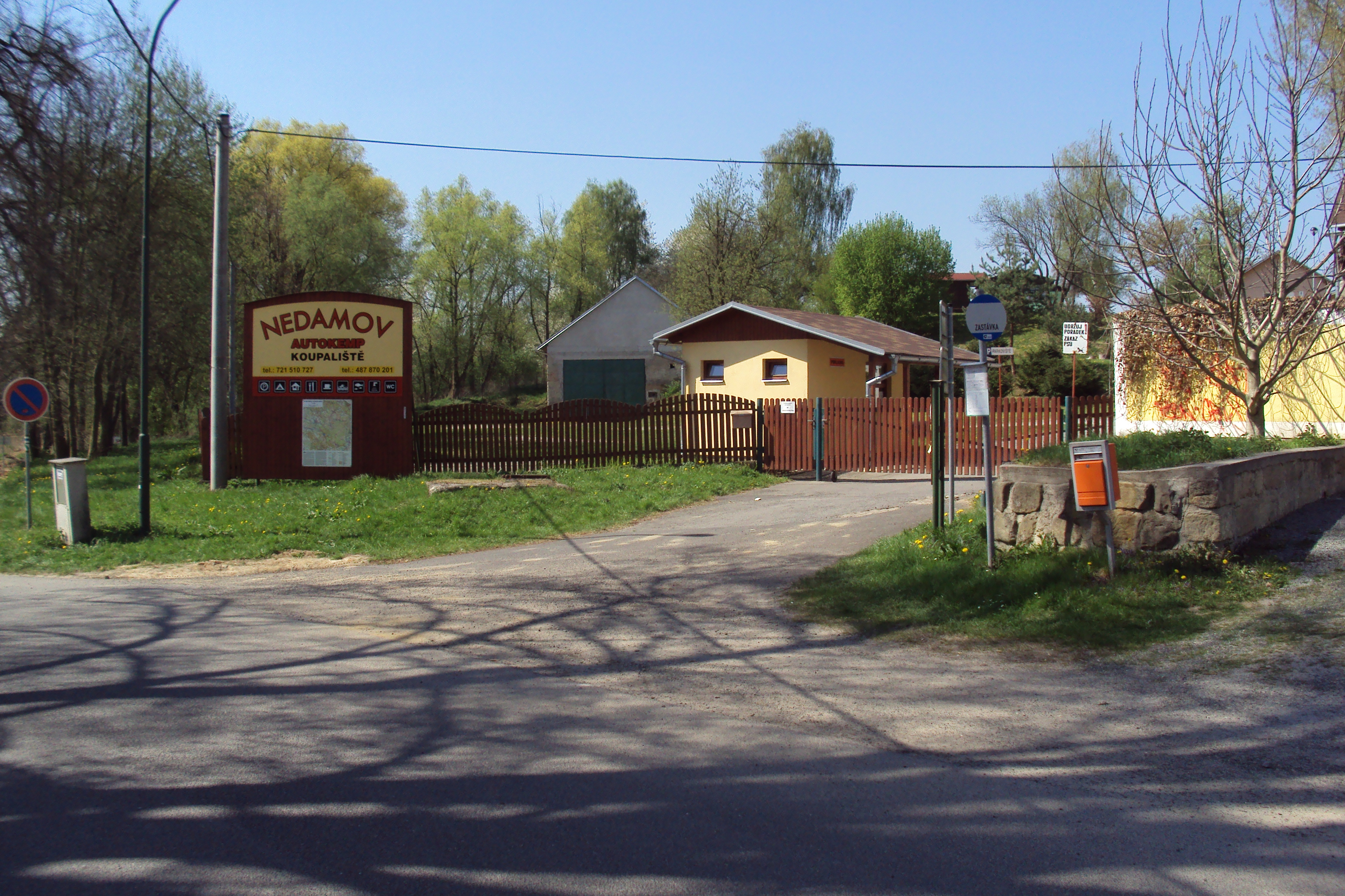 Vchod ke kempu u koupaliště na Černém rybníce, Nedamov u Dobé